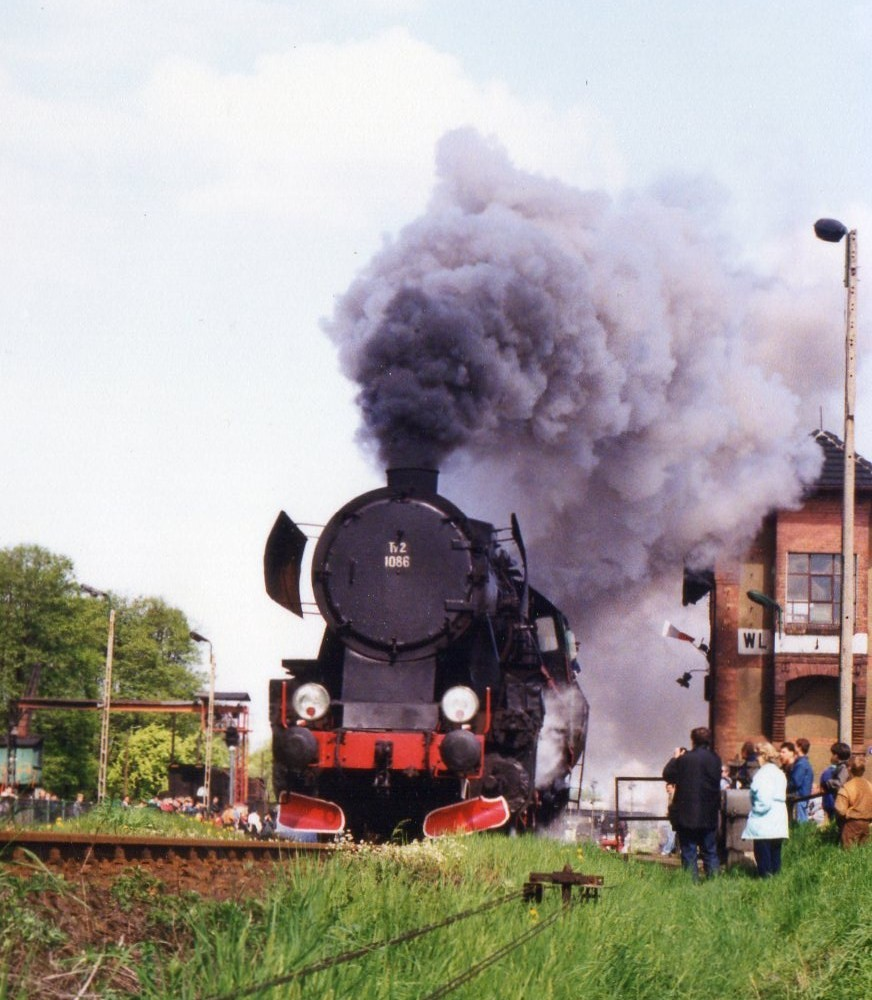 Parada parowozów w Wolsztynie w 1994r.